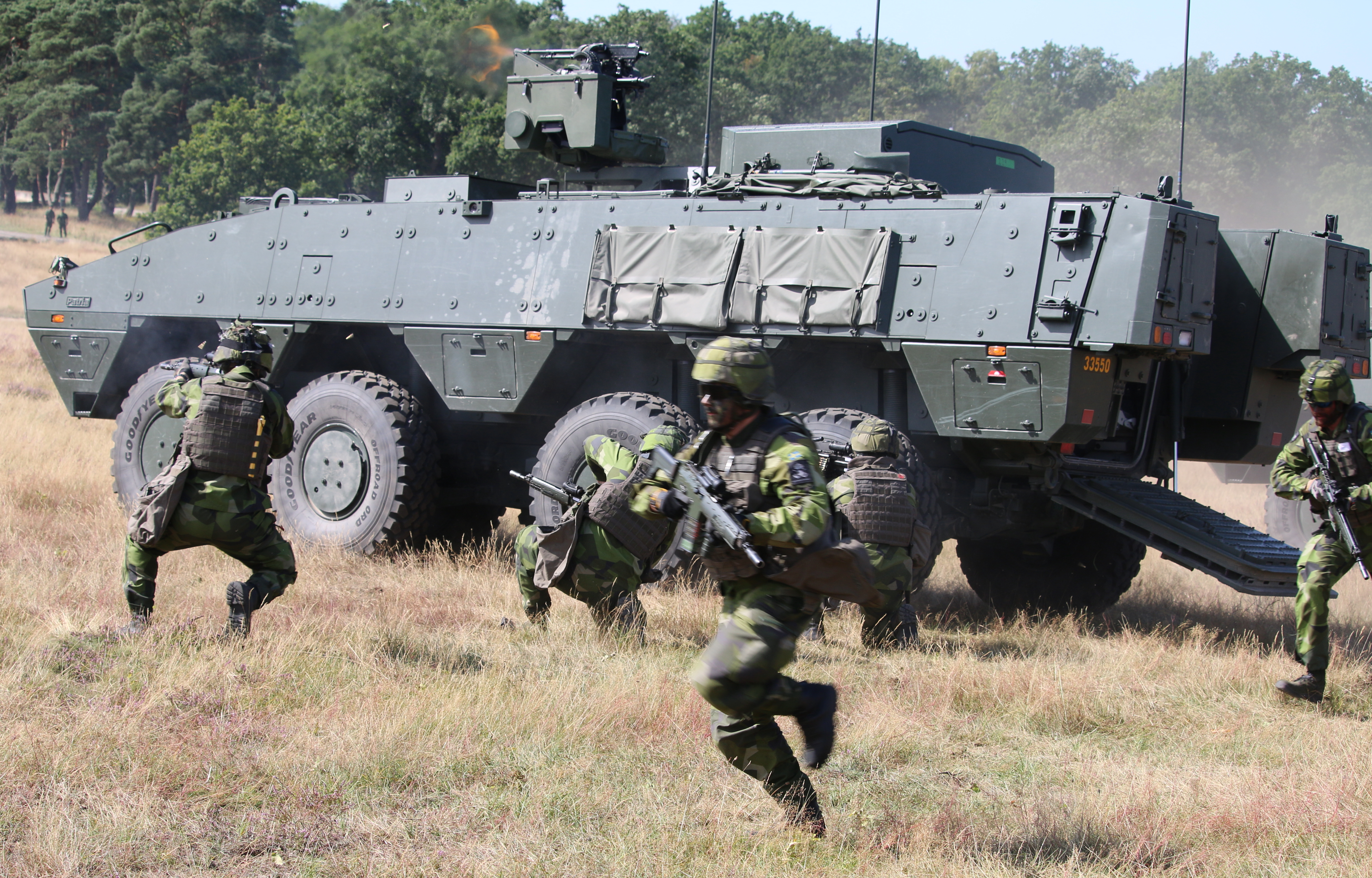 Pansarterrängbil 360 Revinge 2015